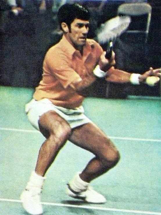 Ken Rosewall en 1973, 'Campioni dello Sport' 1973 - 1974, n°359